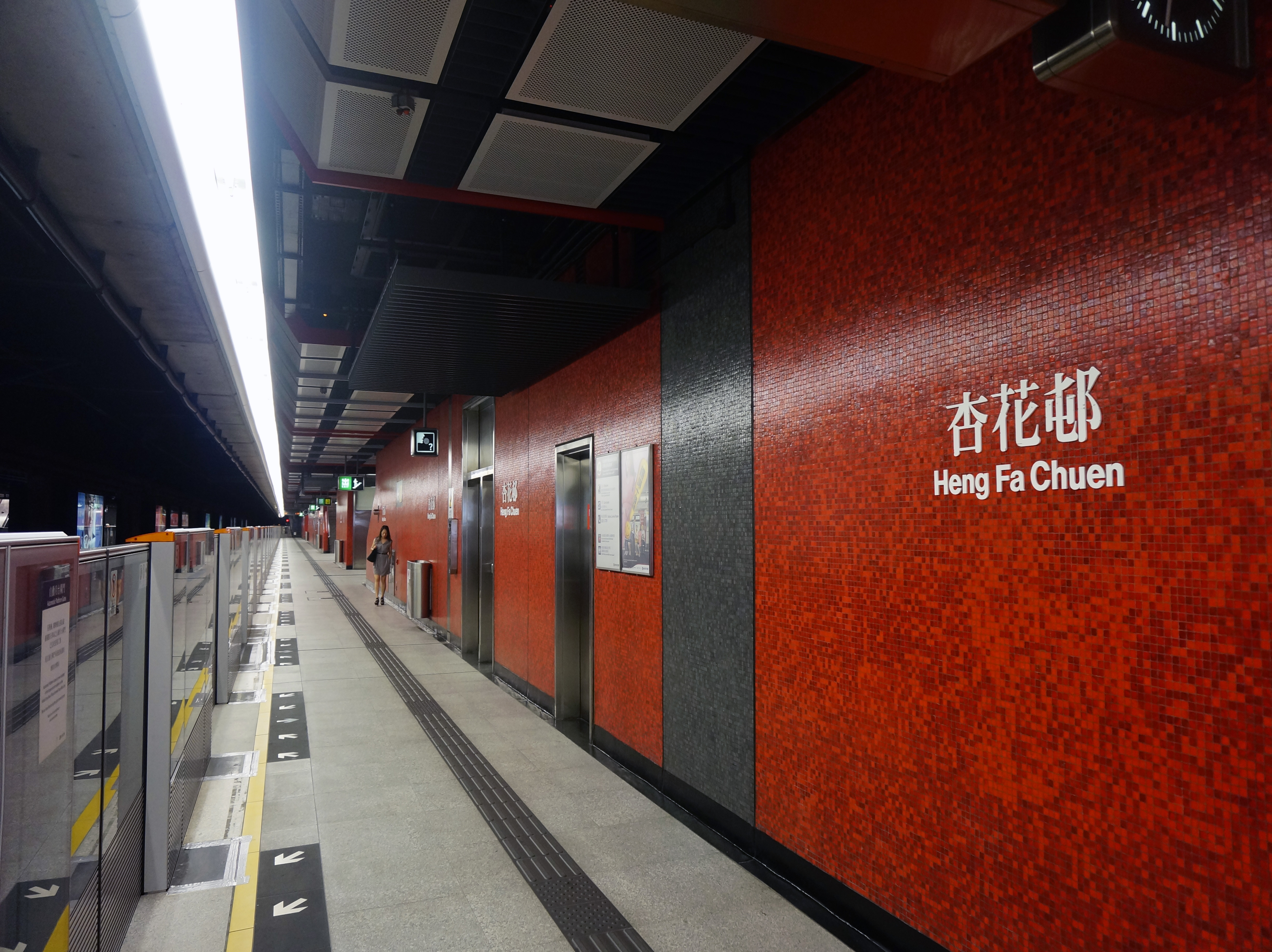 港鐵杏花邨站月台